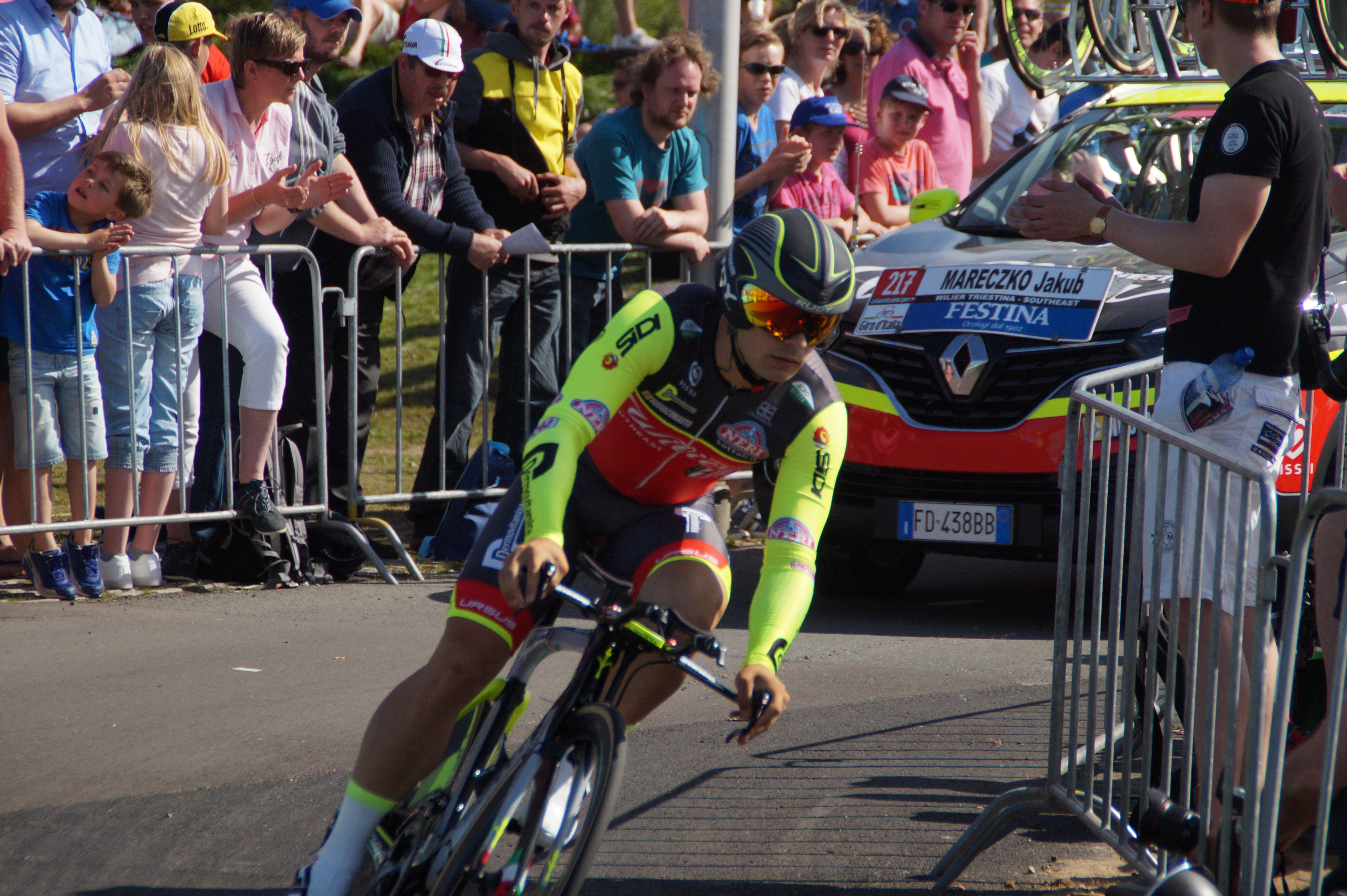 DSC04930 Jakub Mareczko